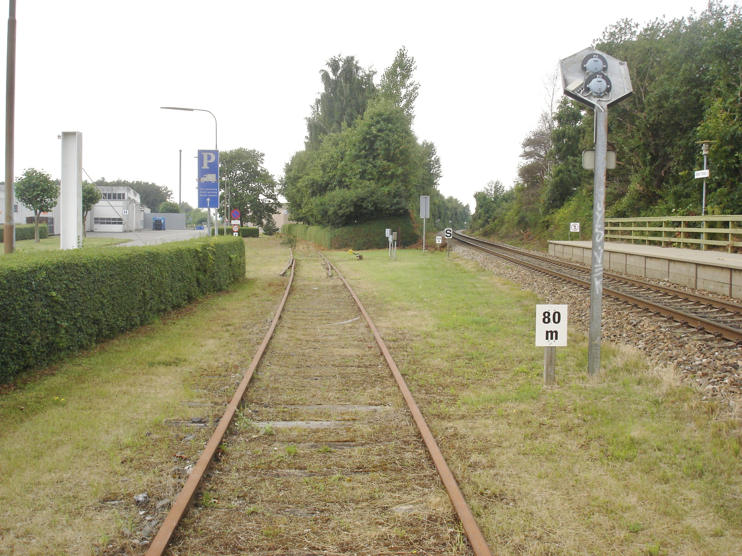 På Øster Toreby station ses Nystedbanens afløbsspor